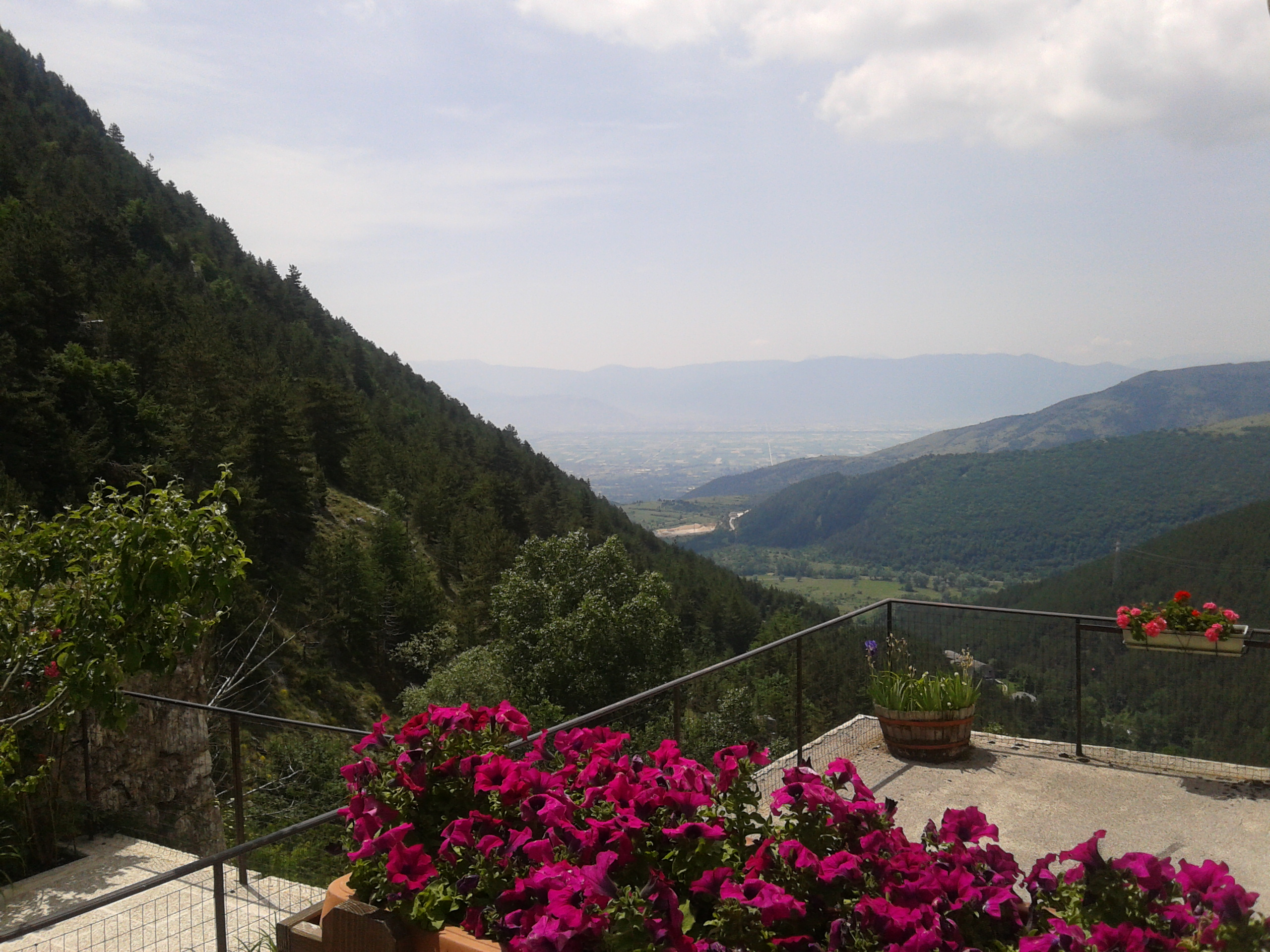 Foto panoramica di Ovindoli